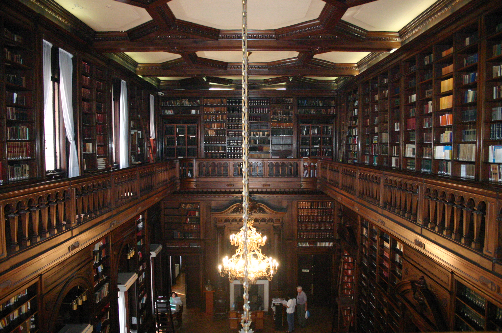 Biblioteca del Palacio de la Legislatura de la Ciudad de Buenos Aires